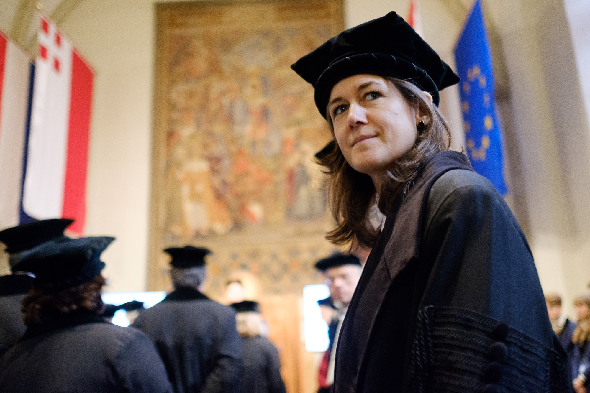 Op 2 maart 2018 hield Annelien Bredenoord, hoogleraar Ethiek van Biomedische Innovatie aan het UMC Utrecht en de Universiteit Utrecht haar oratie met de titel “Kan ethiek de biomedische wetenschap redden?”. Zie voor meer informatie